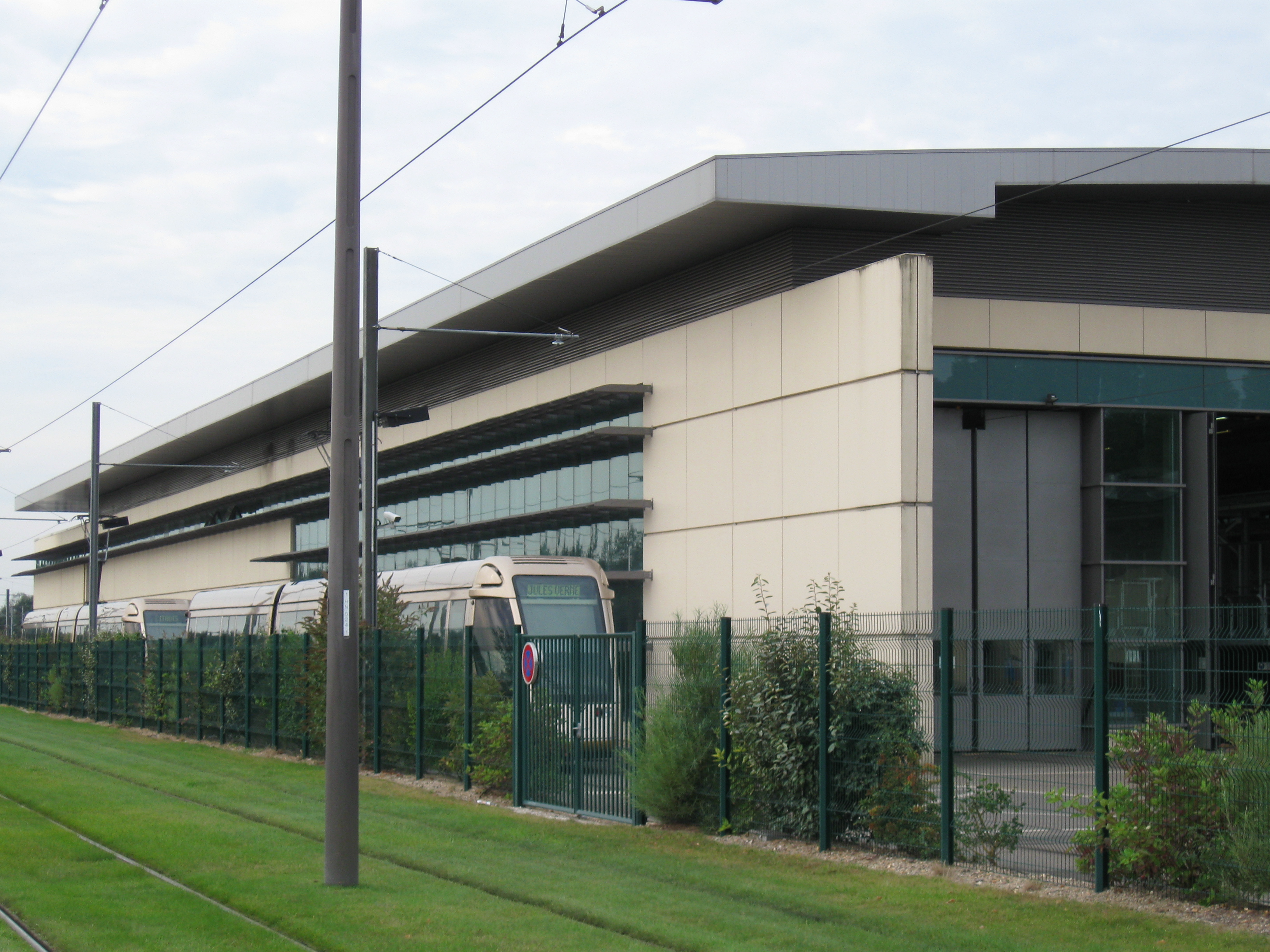 Centre d'entretien du tramway d'Orléans à La Source, Orléans, Loiret, France